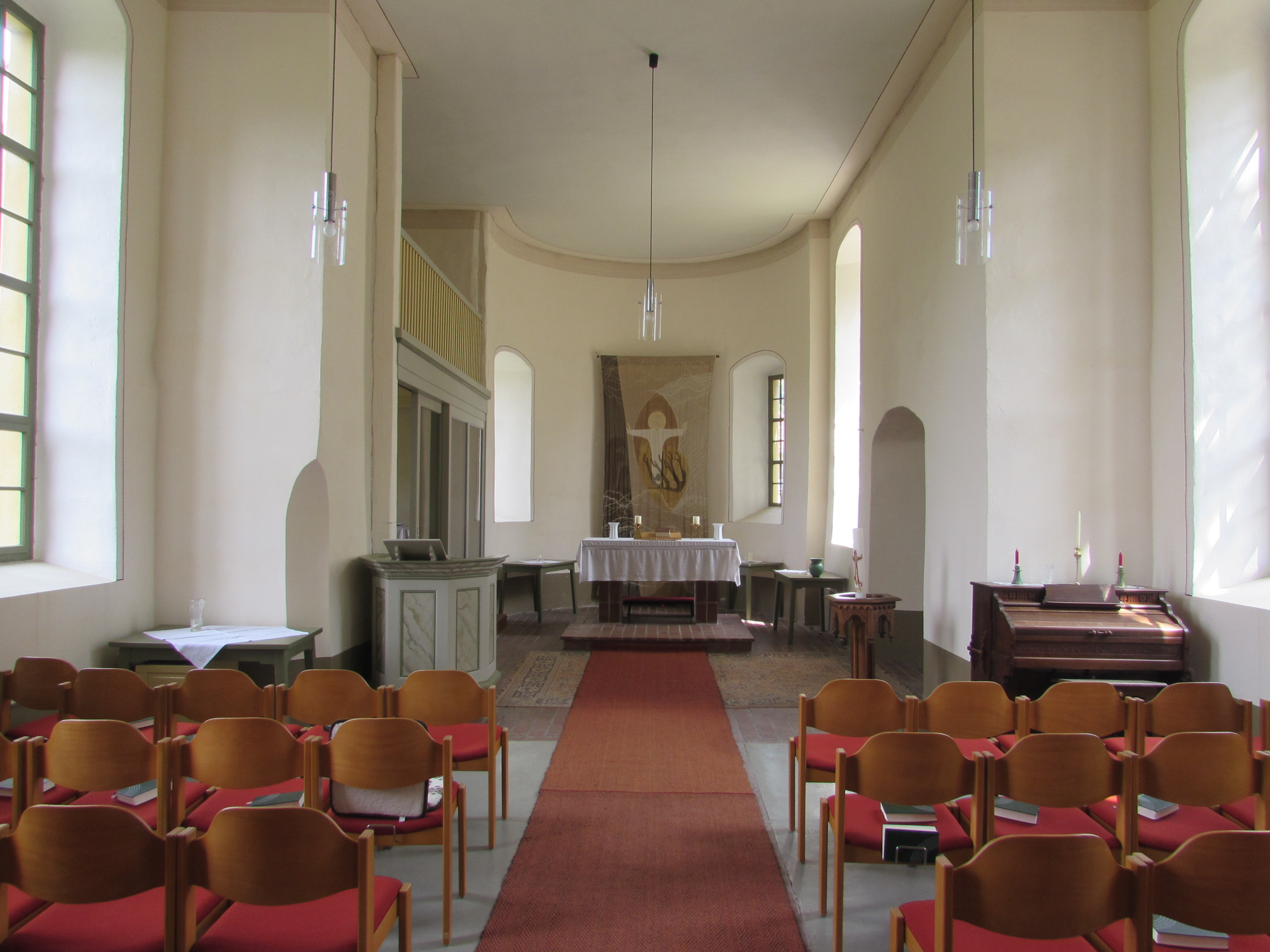 dorfkirche altbensdorf innen